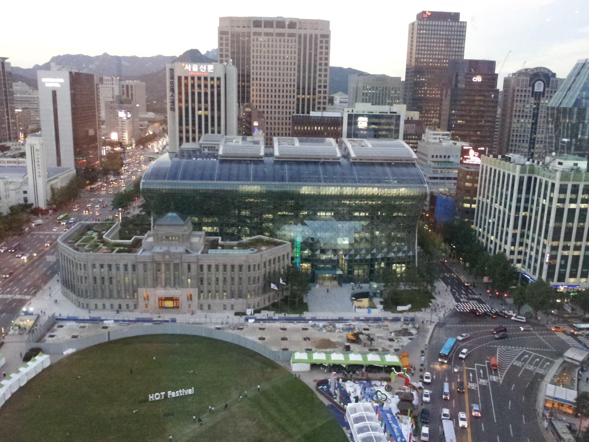 Neuadd Dinas Seoul a Seoul Plaza. (Cymerwyd y llun o fwytu yn uchel yng y Seoul Plaza Hotel.)